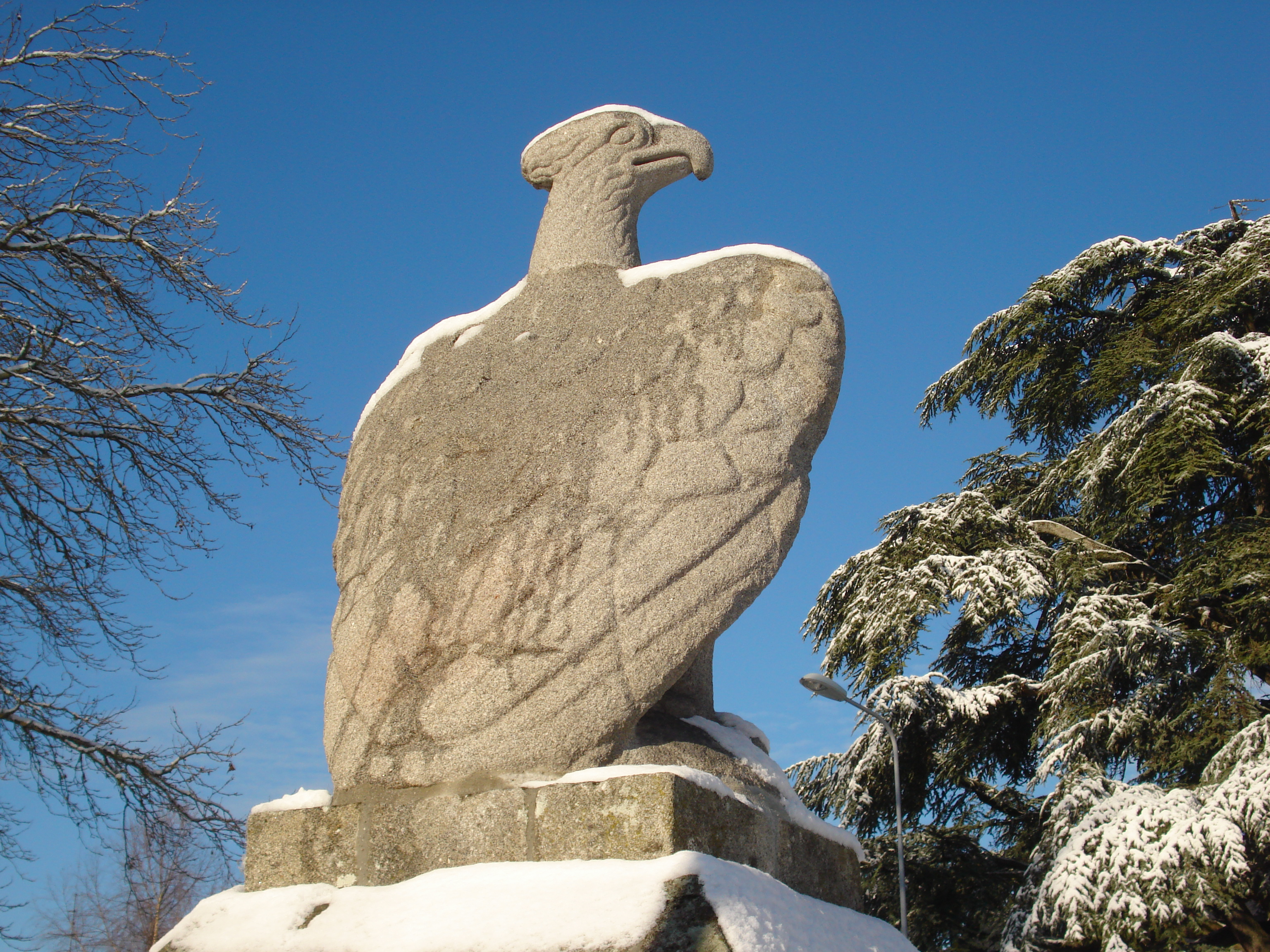 L'aigle romain de la place Voltaire à Ussel (Corrèze)